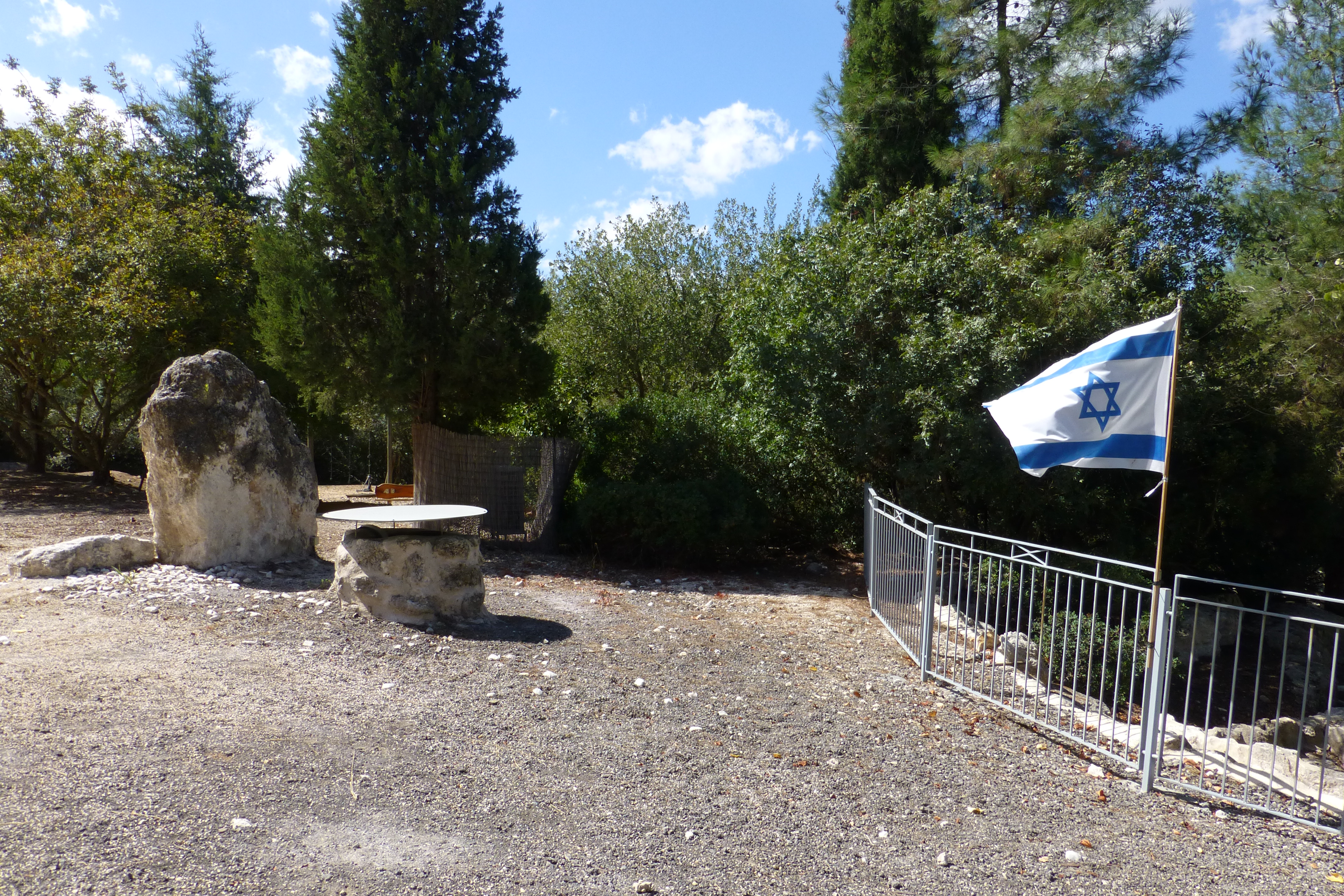 מערת הפלמ"ח במשמר העמק